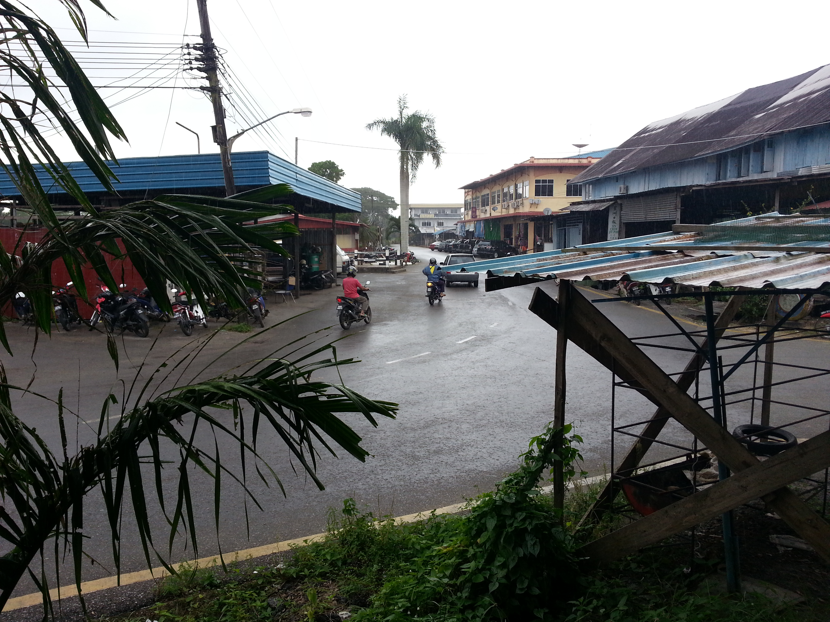 Pekan Daro Sibu